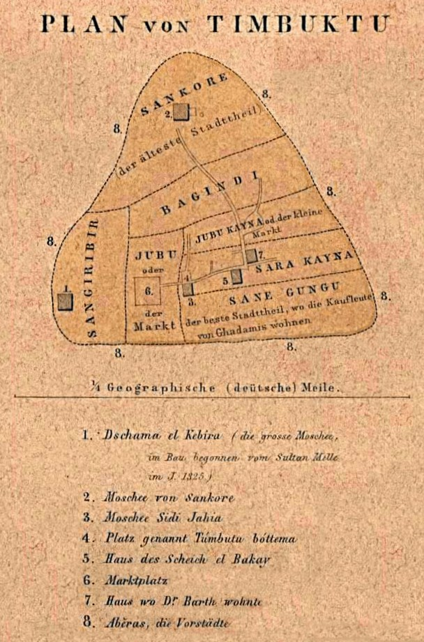 Karte von Timbuktu (Mali) im Jahr 1855.